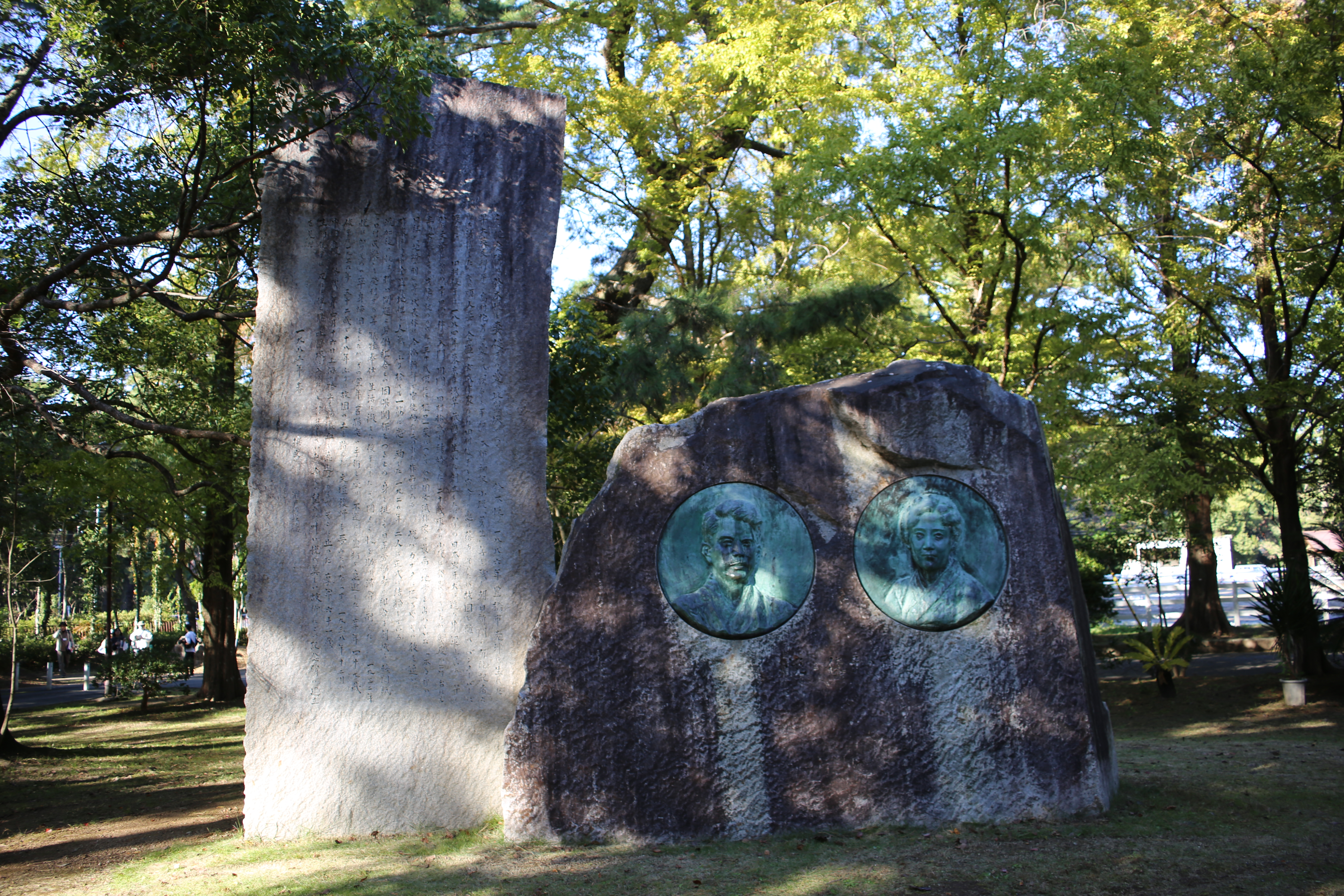 愛知県豊橋市高師緑地内に設置されている鈴木悦・田村俊子記念碑